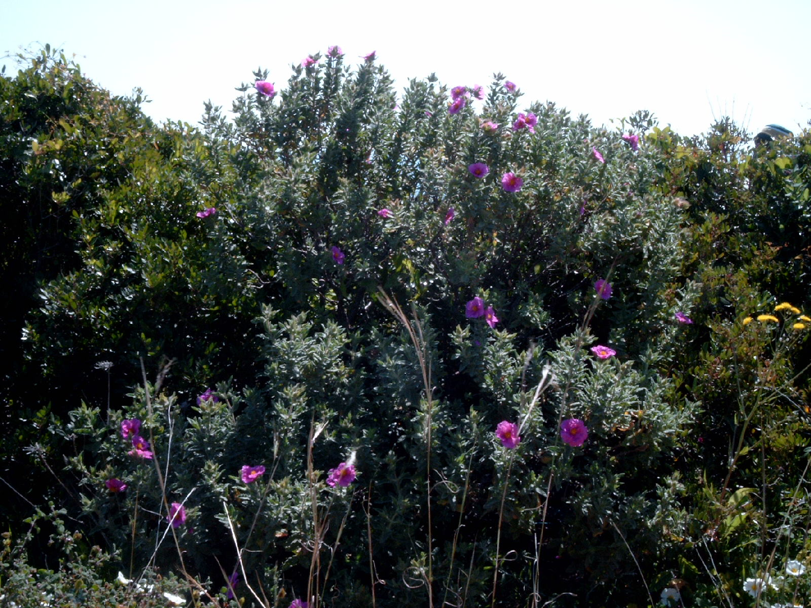 Name Cistus albidus Familiy Cistaceae